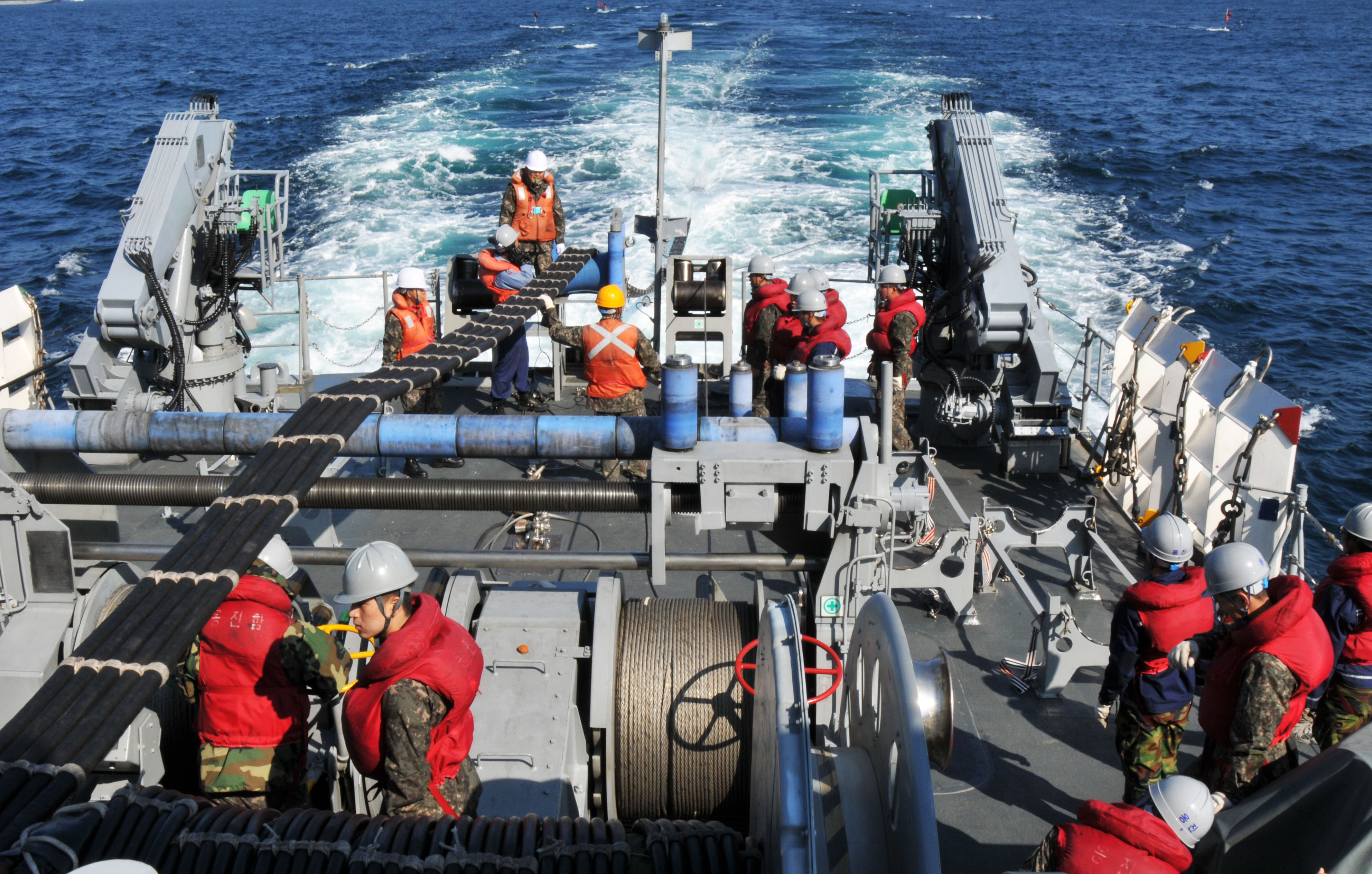 한미 해군은 지난 12일부터 경남 거제도 인근 해상에서 연합 기뢰전 훈련을 실시하였다. 본훈련을 통해 임무수행 능력을 높이고 혈맹관계를 공고히 다지는 성과를 거뒀다 촬영자 : 남기태